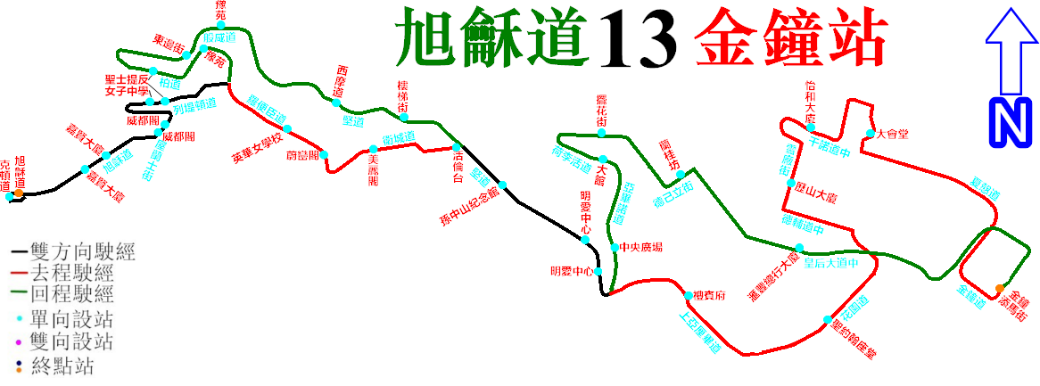 中文（香港）: 新巴13號線的走線圖